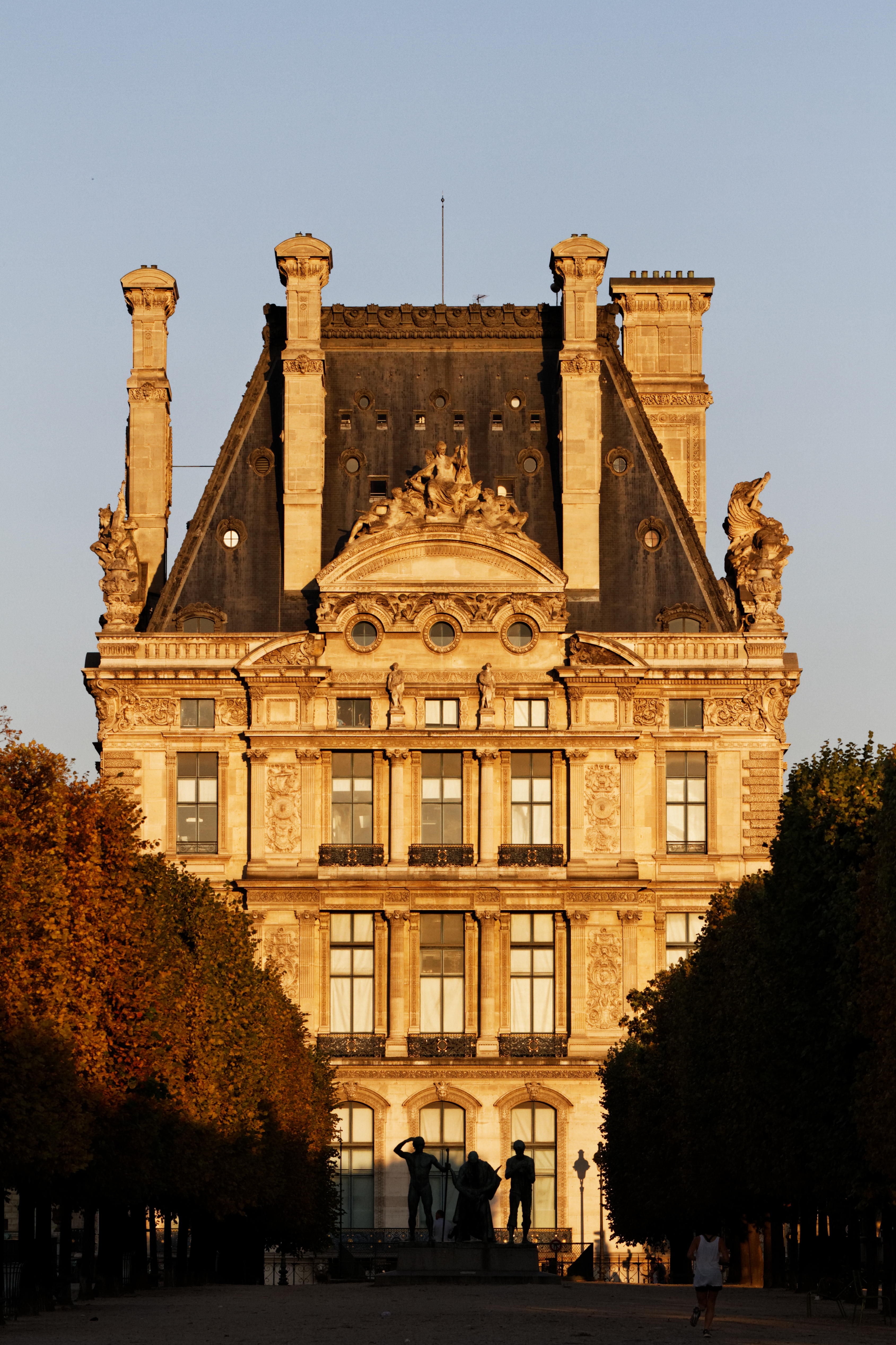 Le palais du Louvre à Paris.